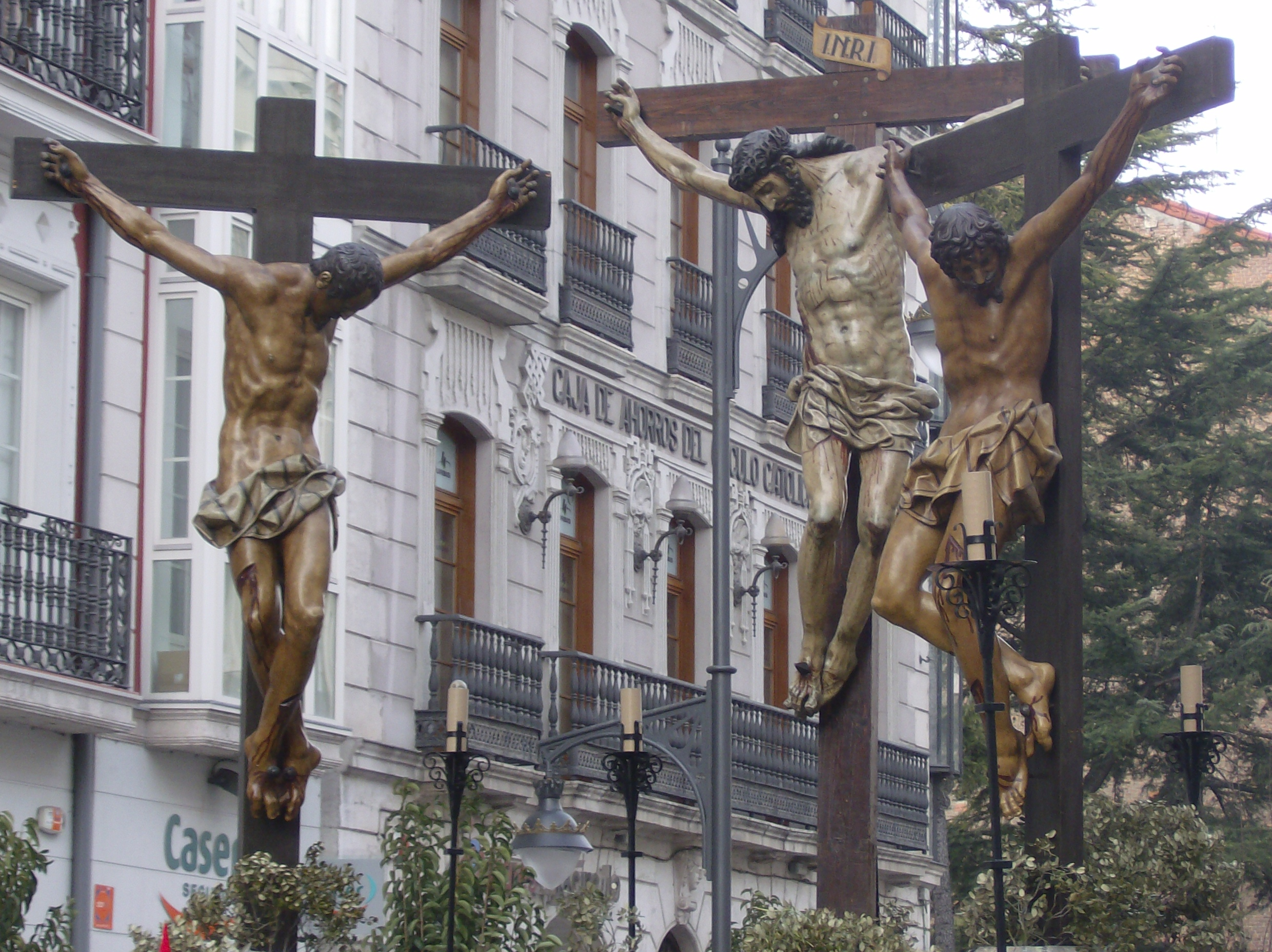 En tus manos encomiendo mi espiritu